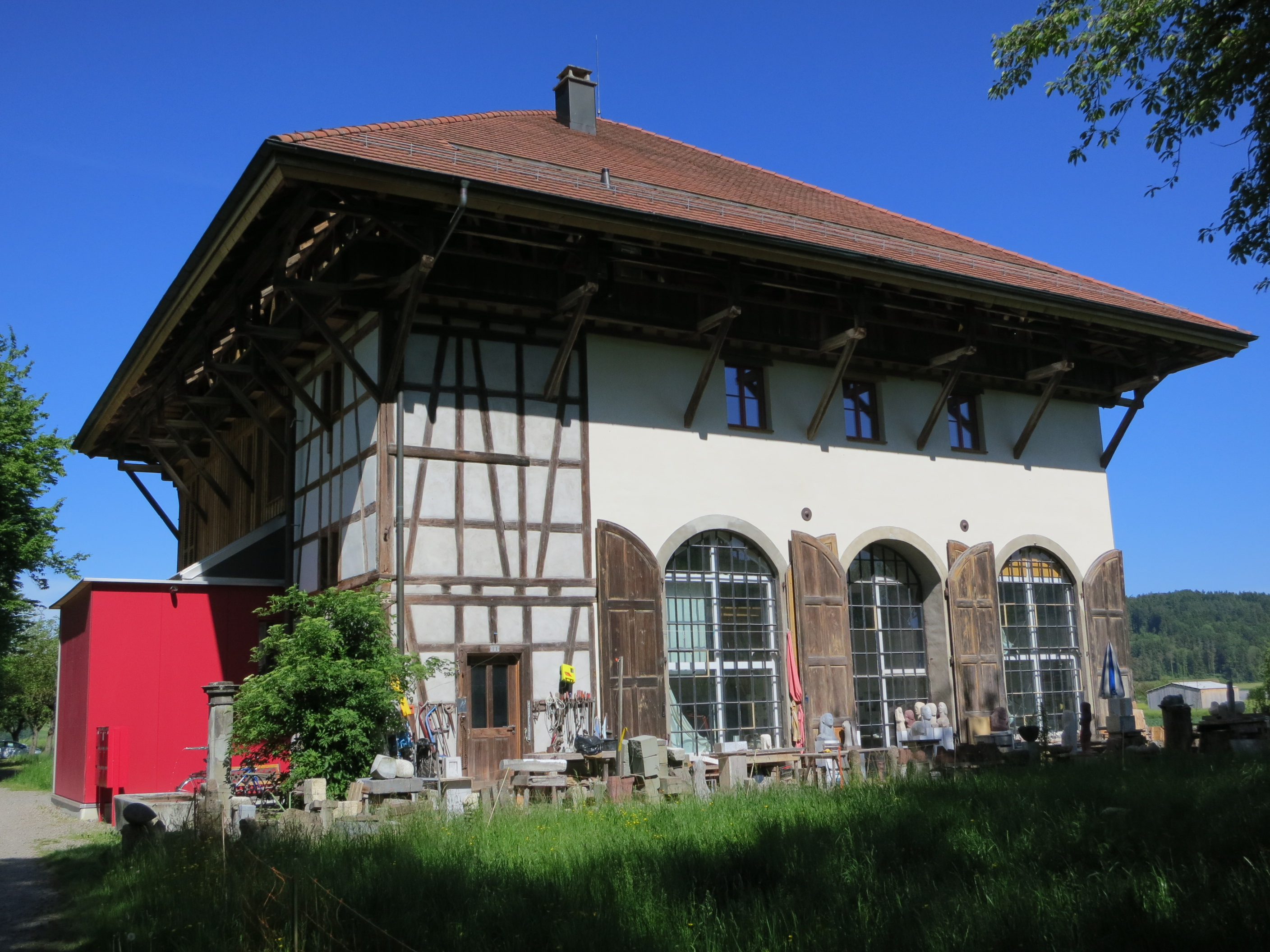 Sulzerhof, Aadorf TG, Schweiz